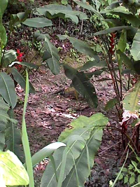 Lecho de la Quebrada La Boyera a nivel del Polideportivo